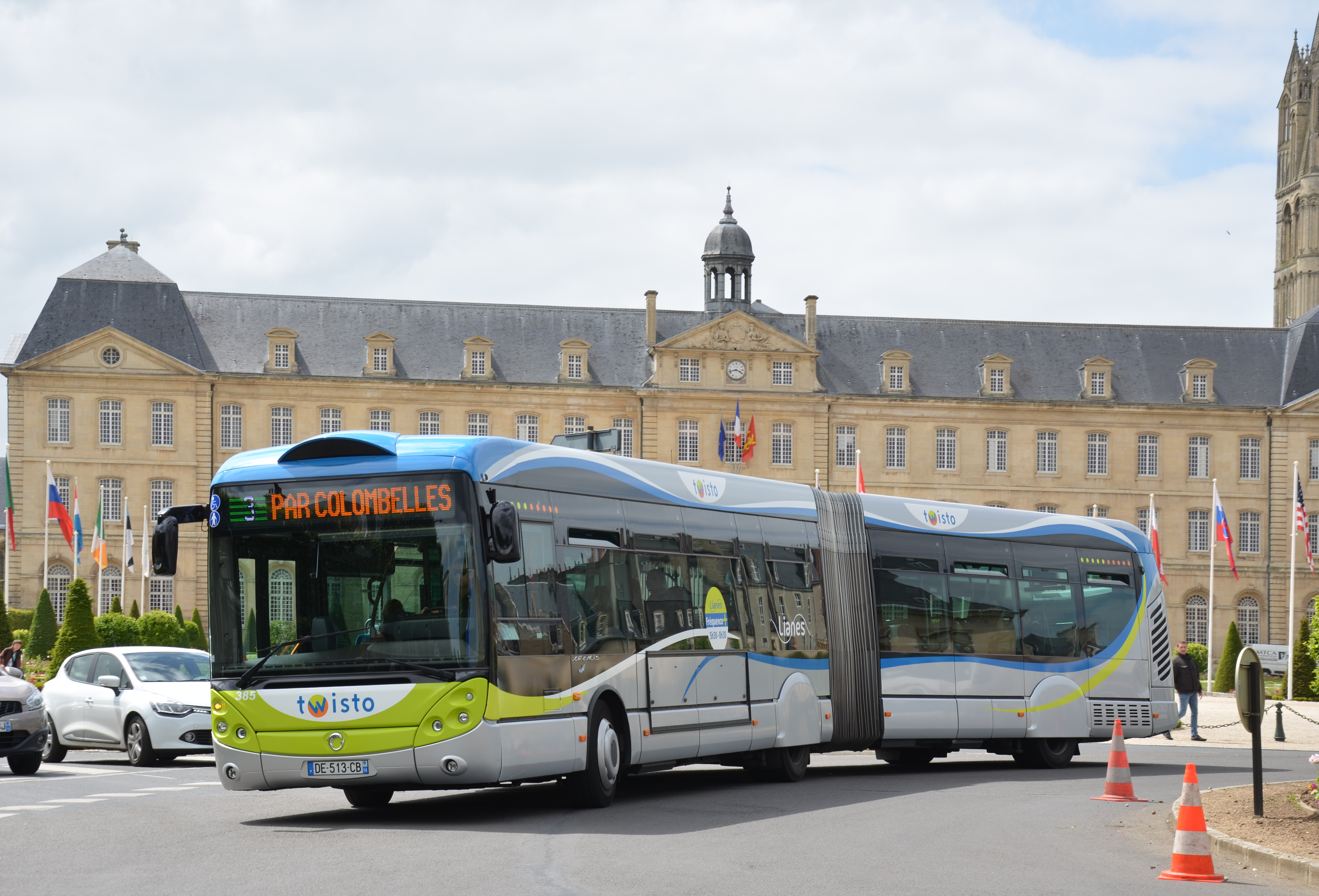 Irisbus Crealis 18 n°385 sur la ligne 3 du réseau TWISTO devant l'Hôtel de Ville de Caen.